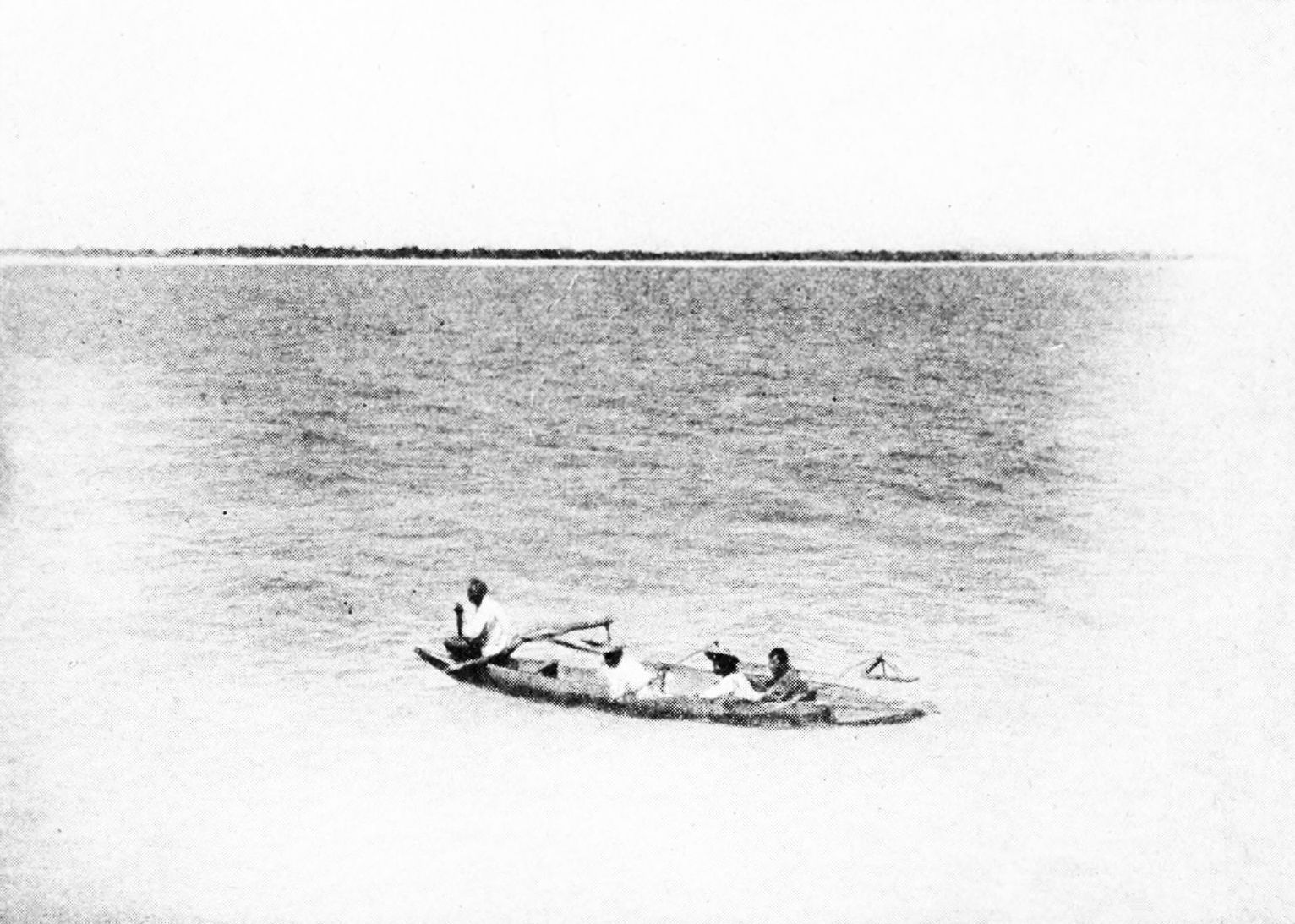 Canoe at Nukutavake atoll Paumotus